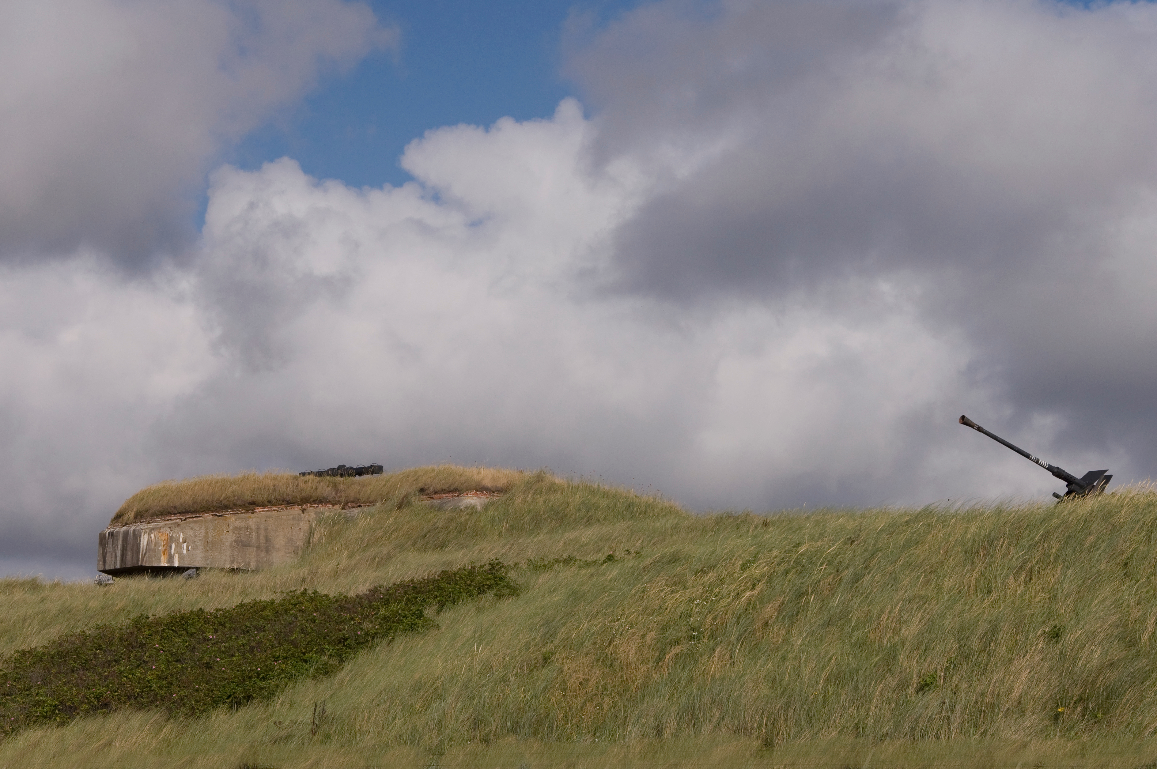 Een deel van het Openluchtmuseum Atlantikwall te Raversijde, Oostende, België